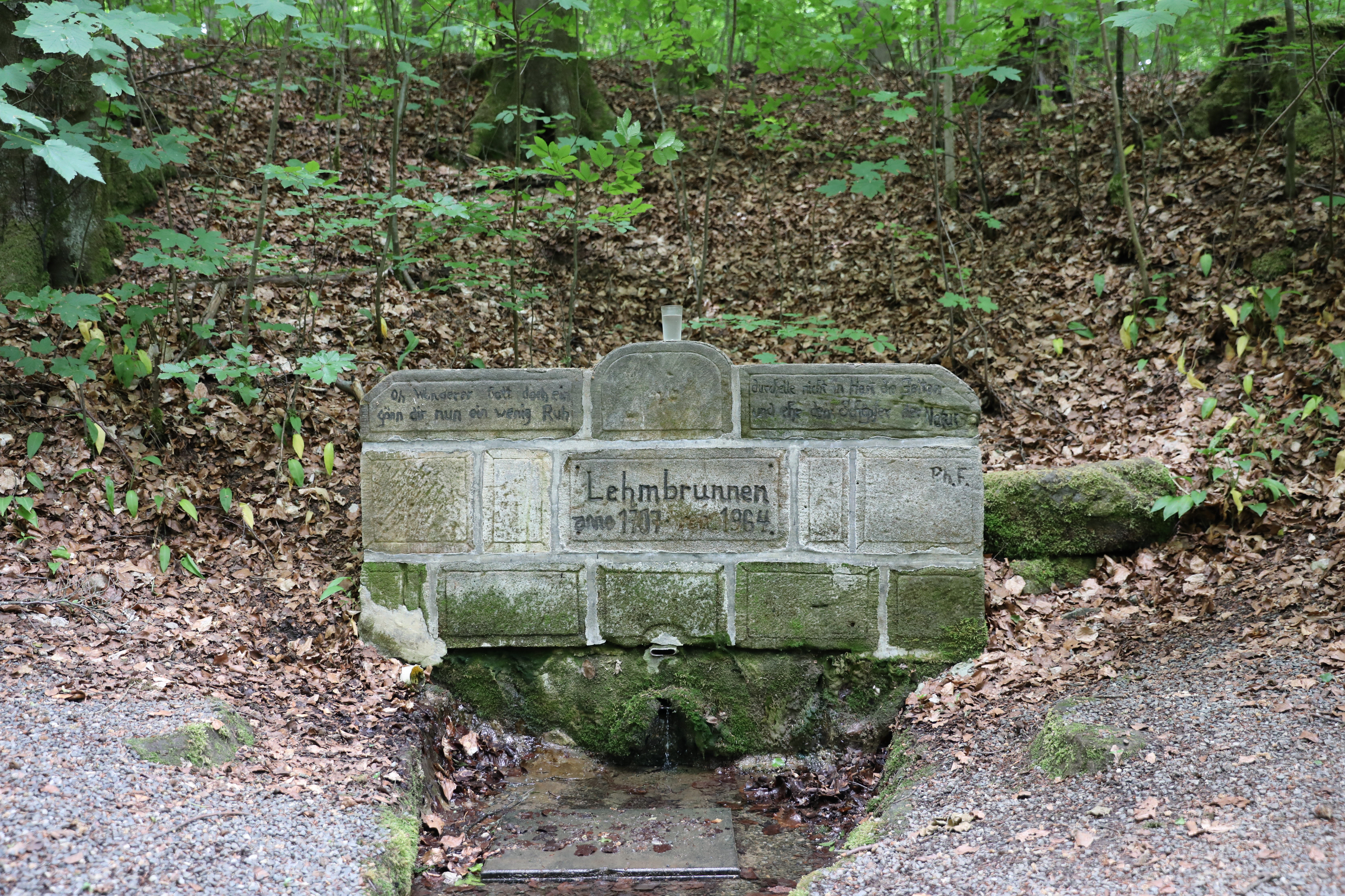 Brunnen bei Klosterlangheim, Lichtenfels